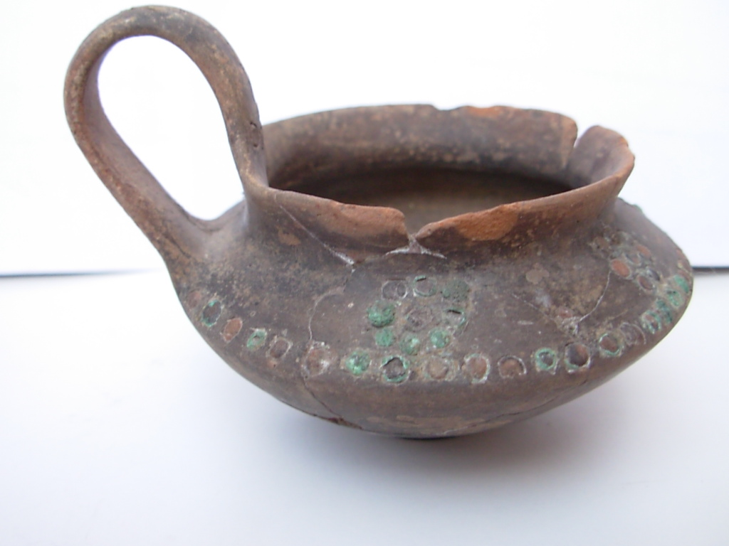 Tazza decorata con borchie di bronzo da Sorgà